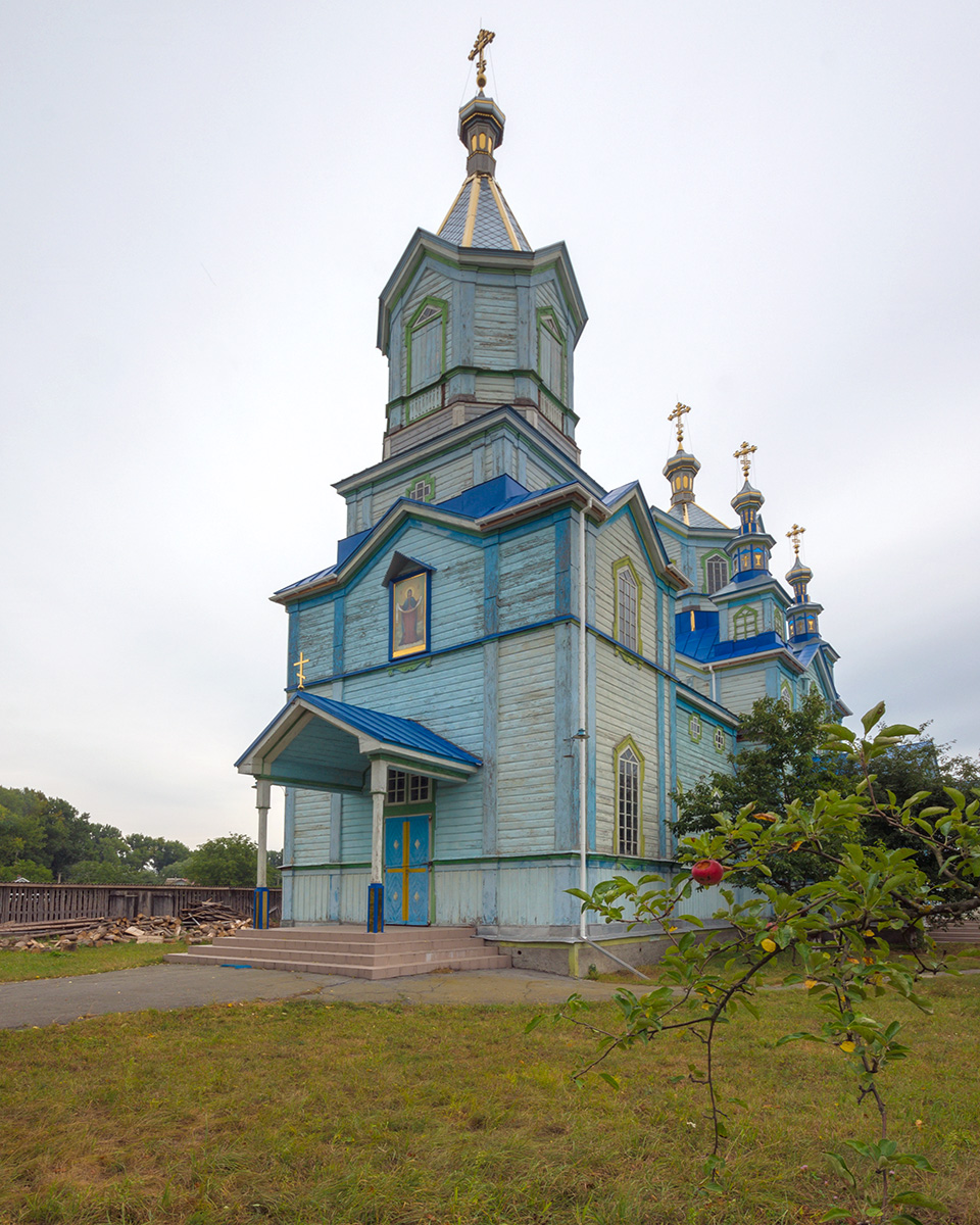 Покровська церква, с. Ярунь